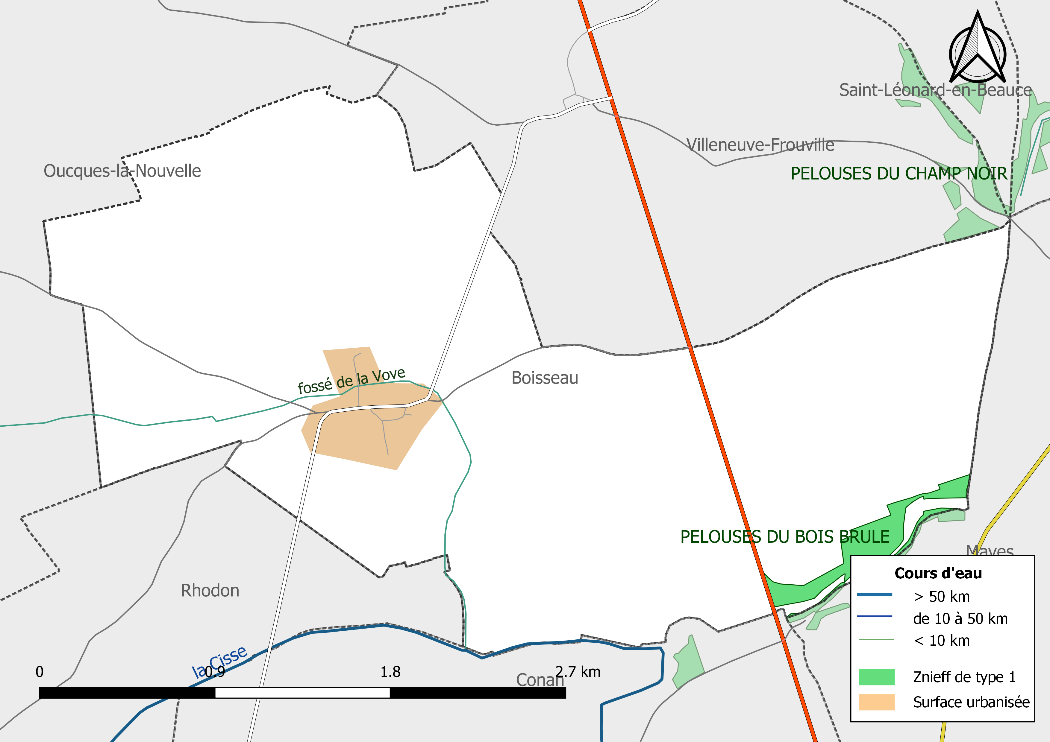 Carte des Zones naturelles d'intérêt écologique faunistique et Floristique (ZNIEFF) de type1 de la commune de Boisseau (Loir-et-Cher) (France).